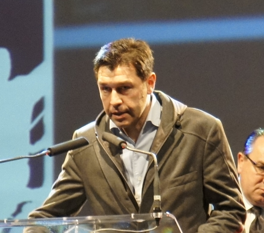 Hubert Fournier, entraineur du Stade de Reims .